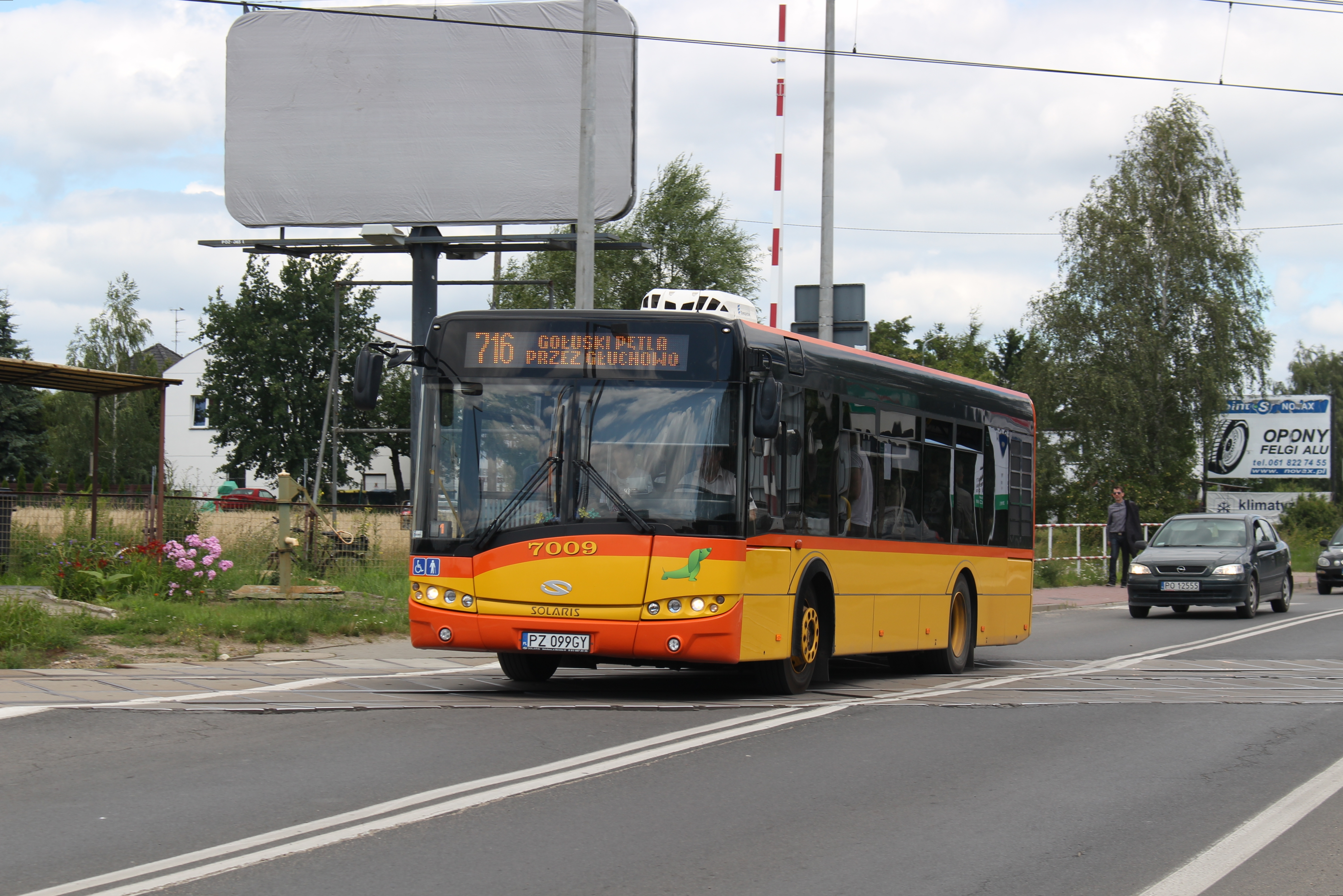 Poznan Junikowo, 7 July 2016.